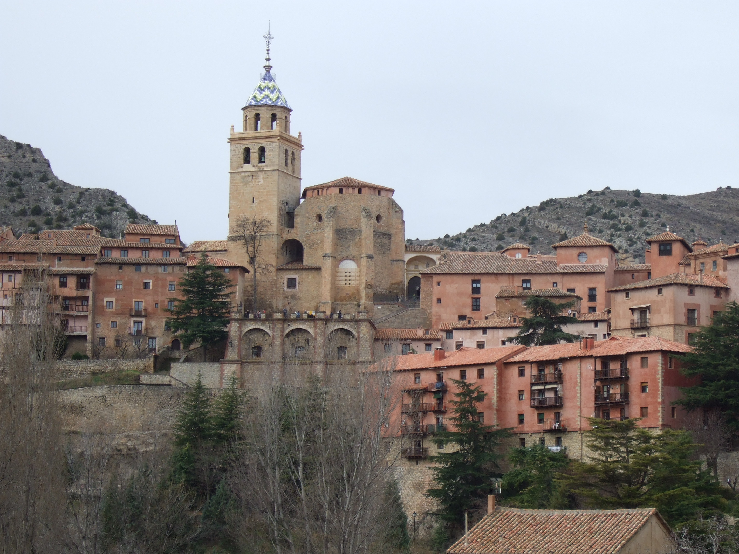 Albarracín - Vista con catedral